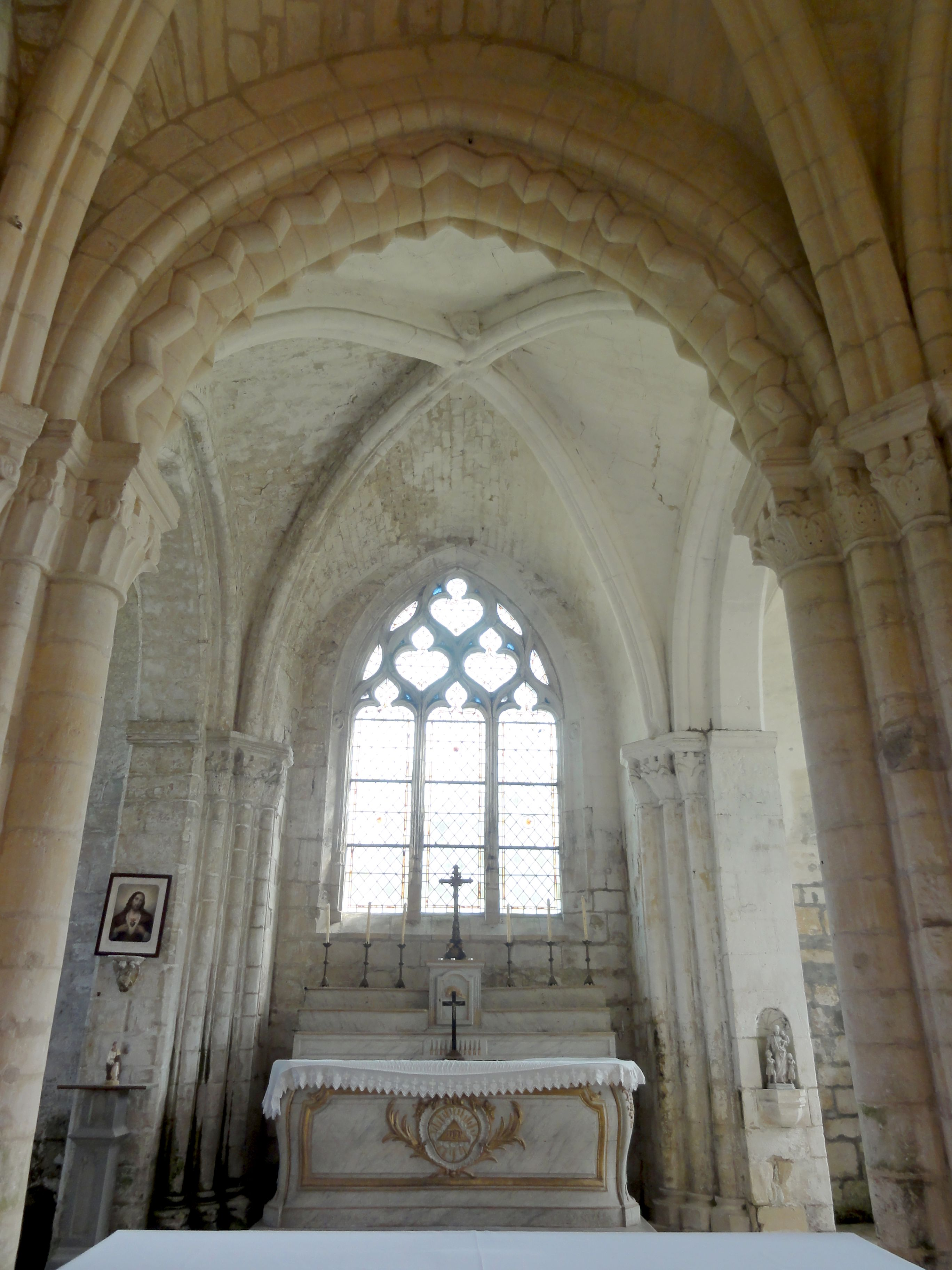 Croisée, vue vers l'est.